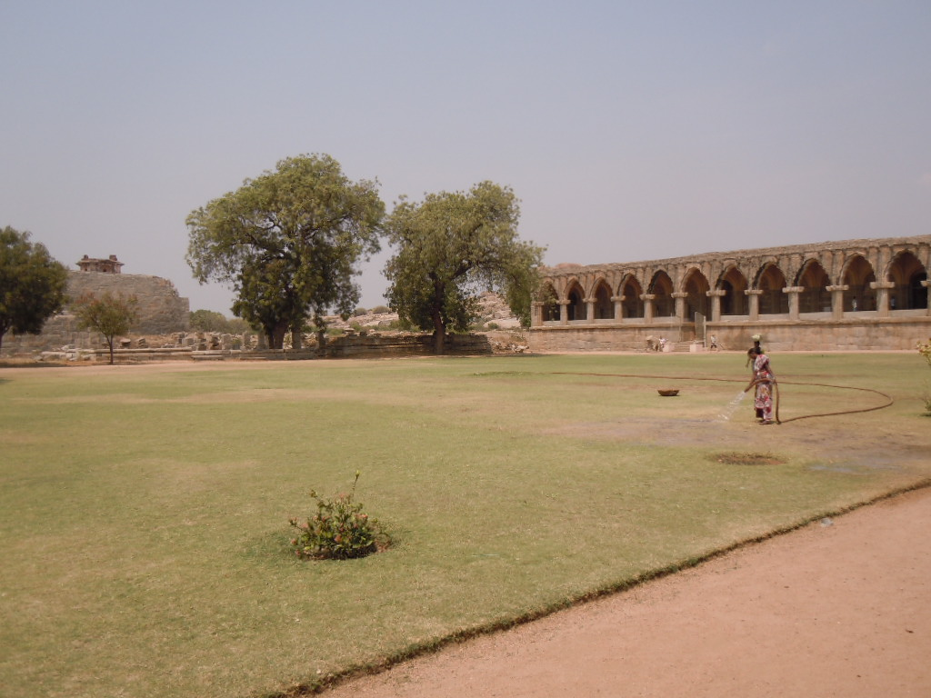 Hampi - Alloggiamenti delle guardie (di fianco alle stalle reali)